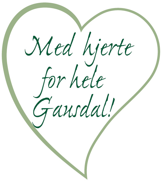 Bygdalista - med hjerte for hele Gausdal!